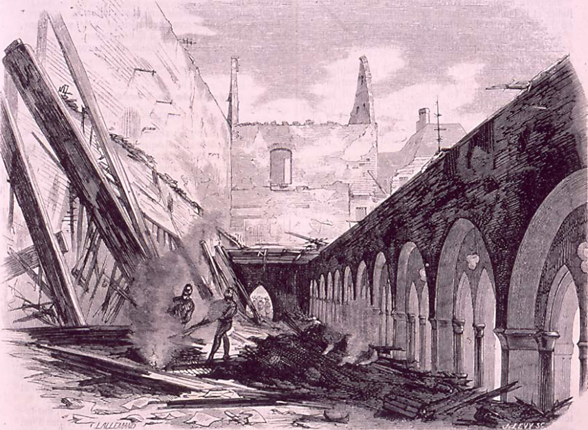 Ruines du couvent des dominicains de Strasbourg suite à l’incendie du 29 juin 1860.